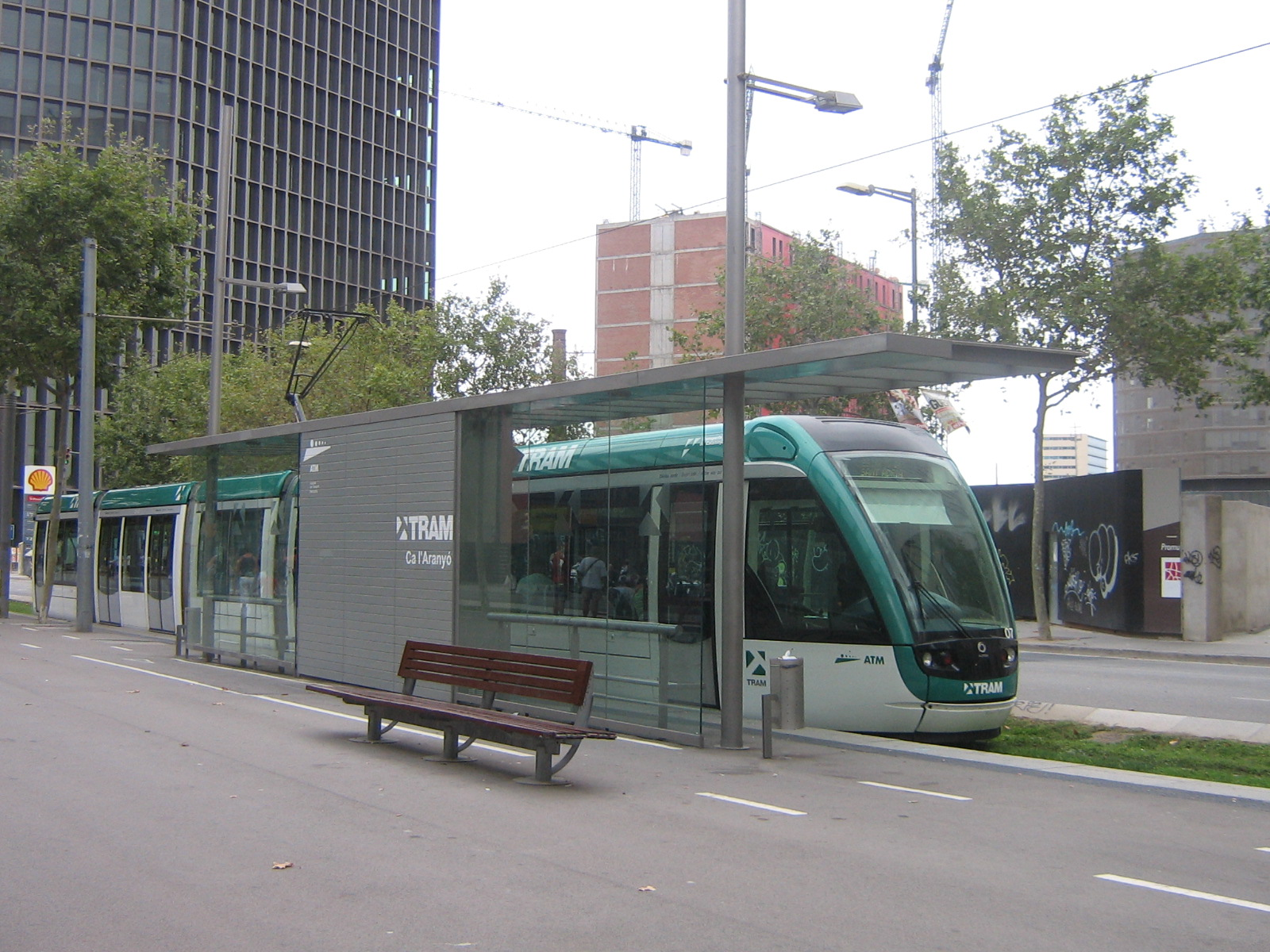 Estación de Trambesòs en Ca l'Aranyó (Barcelona)